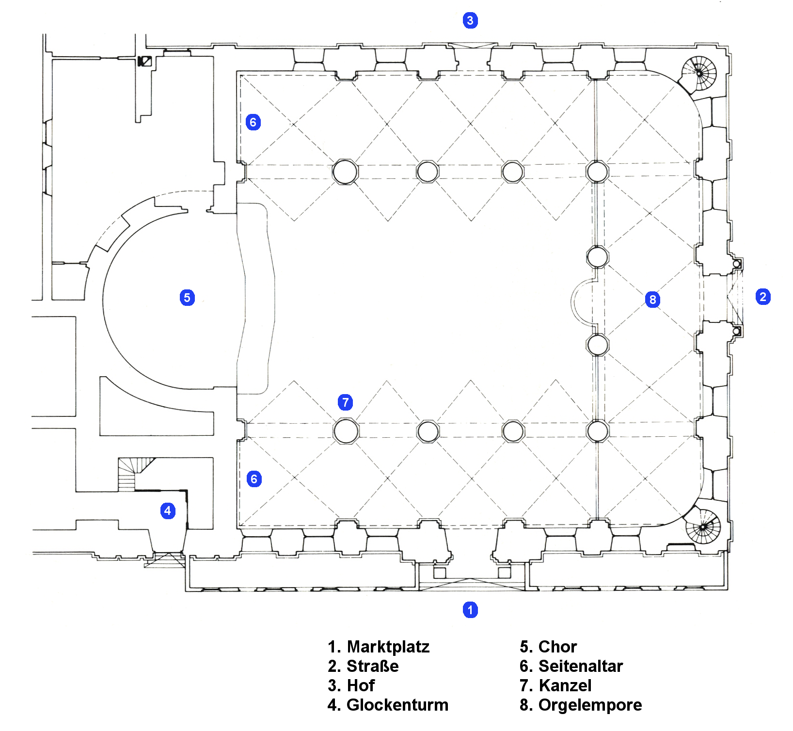 Grundriss der St.-Sebastian-Kirche in Mannheim.